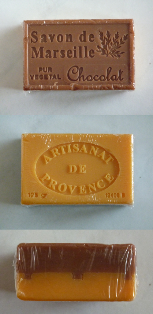 Zweischichtige, abgepackte französische Kernseife